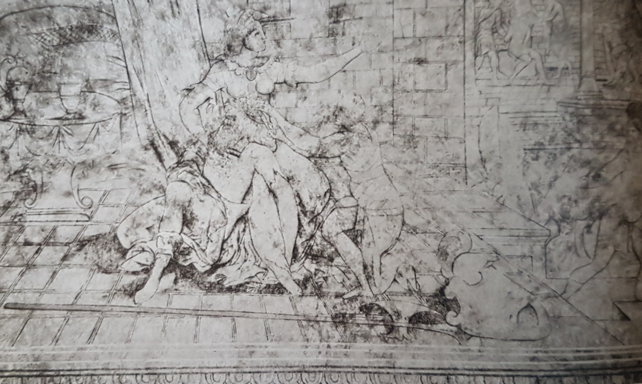 Scener ur Simsons hus målade på Kalmar slott av Arendt Lanprechts , avfotograferad bild från Allhems Svenskt konstnärslexikon.